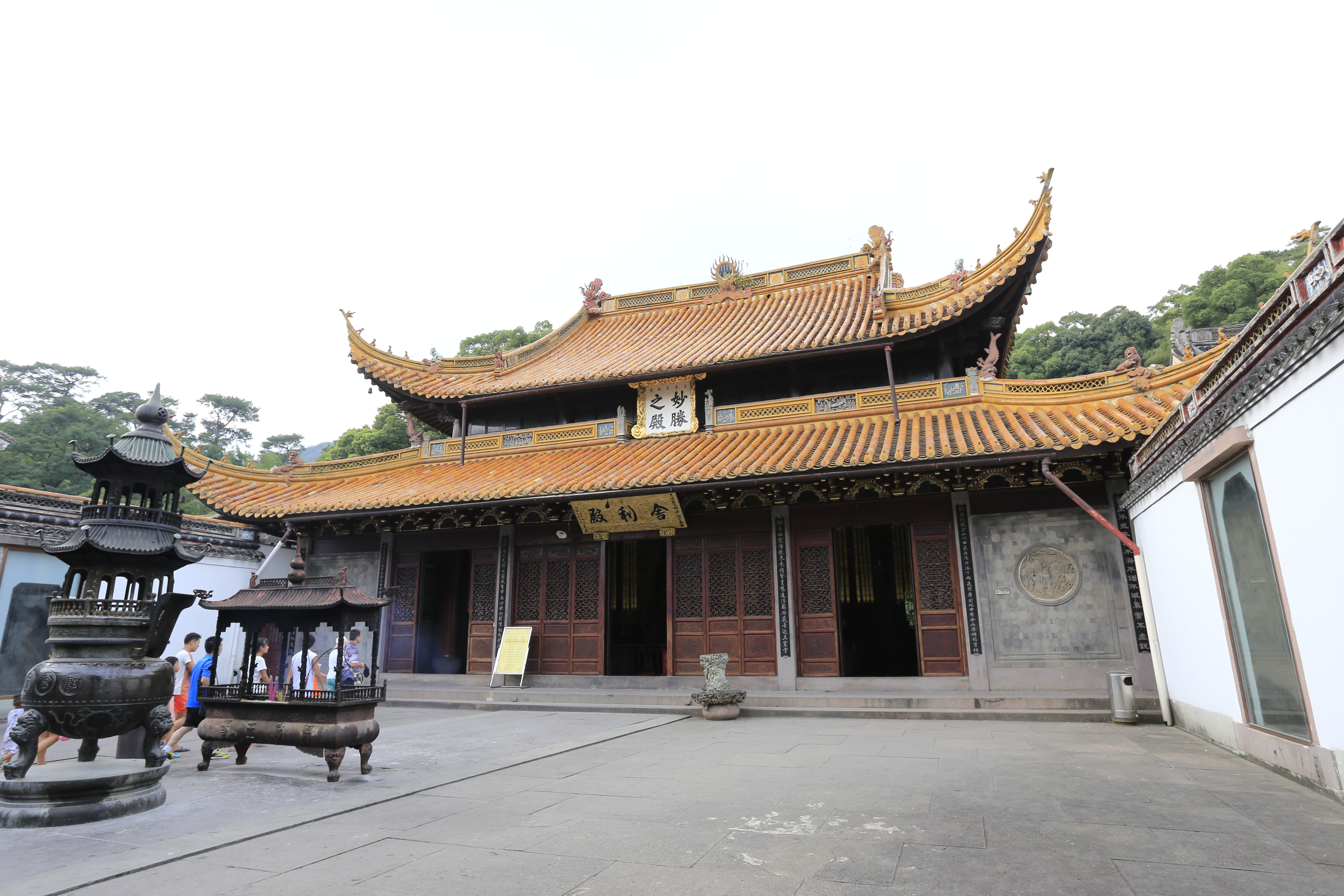 宁波阿育王寺 —— 舍利殿